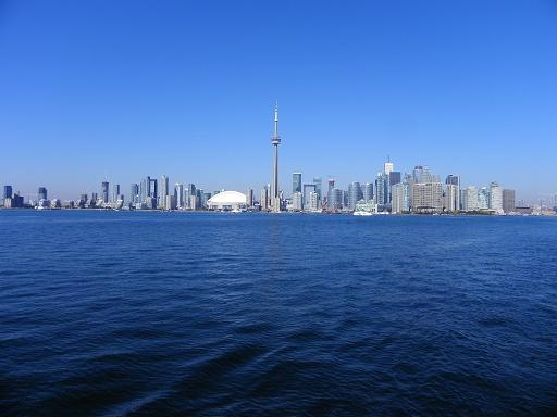 Toronto Skyline